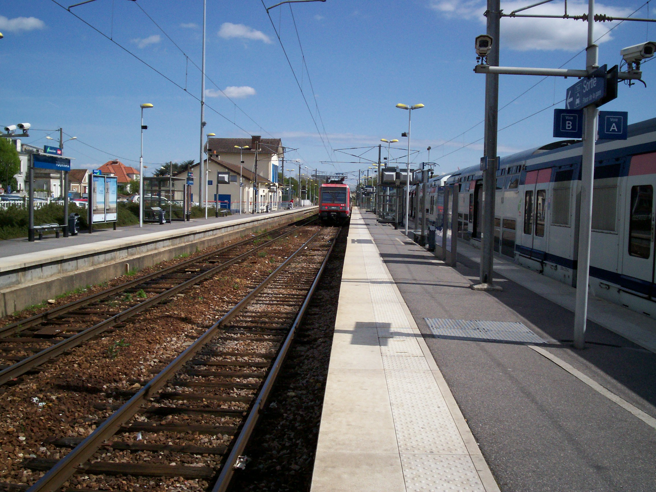 Gare de Tournan